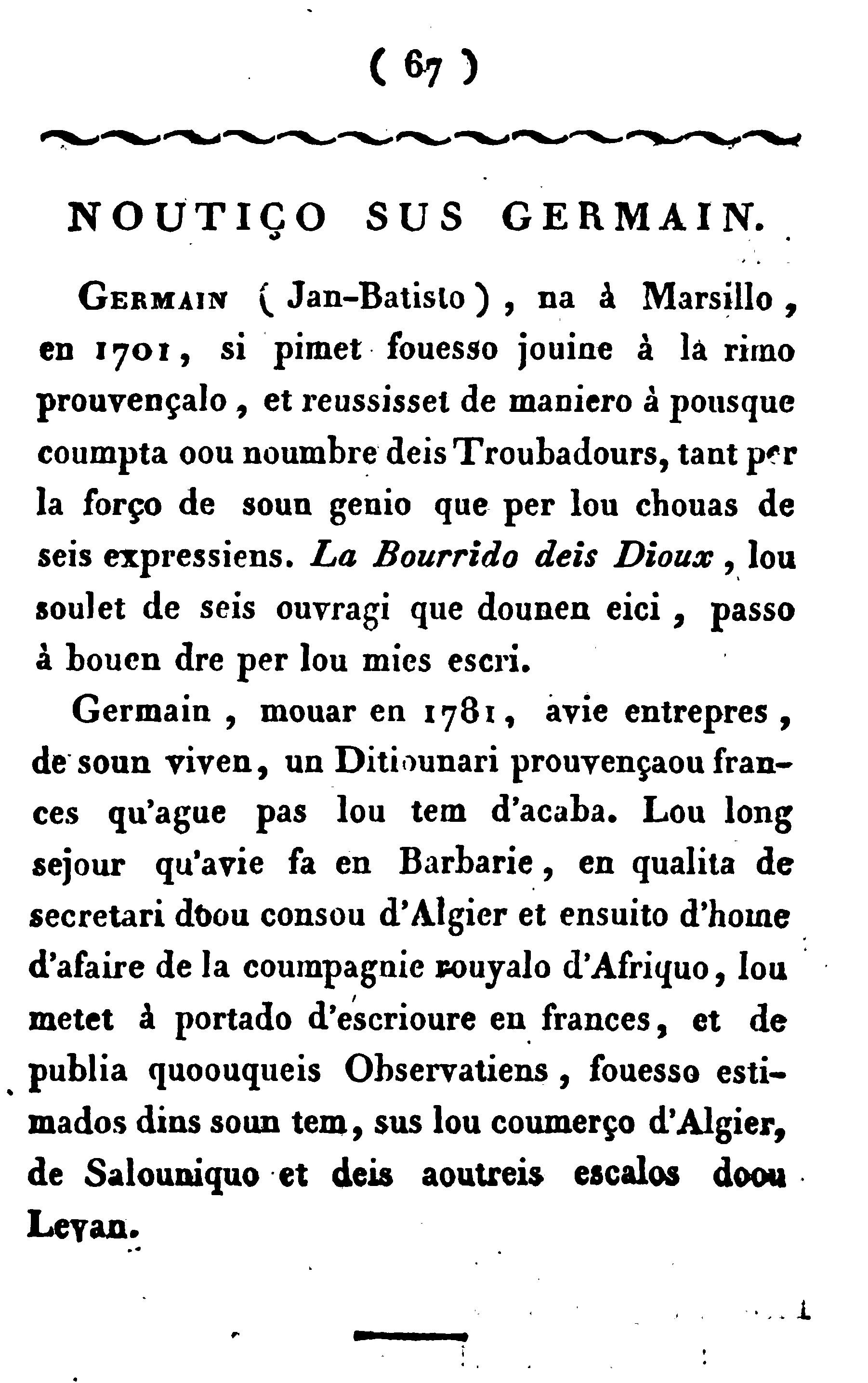 Edicion d'Achard, 1820 dins Lo Boquet provençau